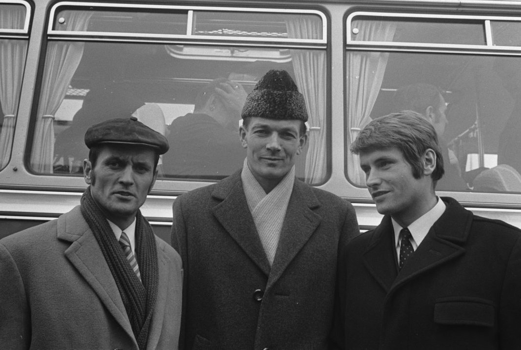 Aankomst van het voetbalelftal van Vorwärts Berlin op Schiphol. V.l.n.r. Otto Frässdorf, Hans-Georg Kiupel (trainer), Gerhard Körner.